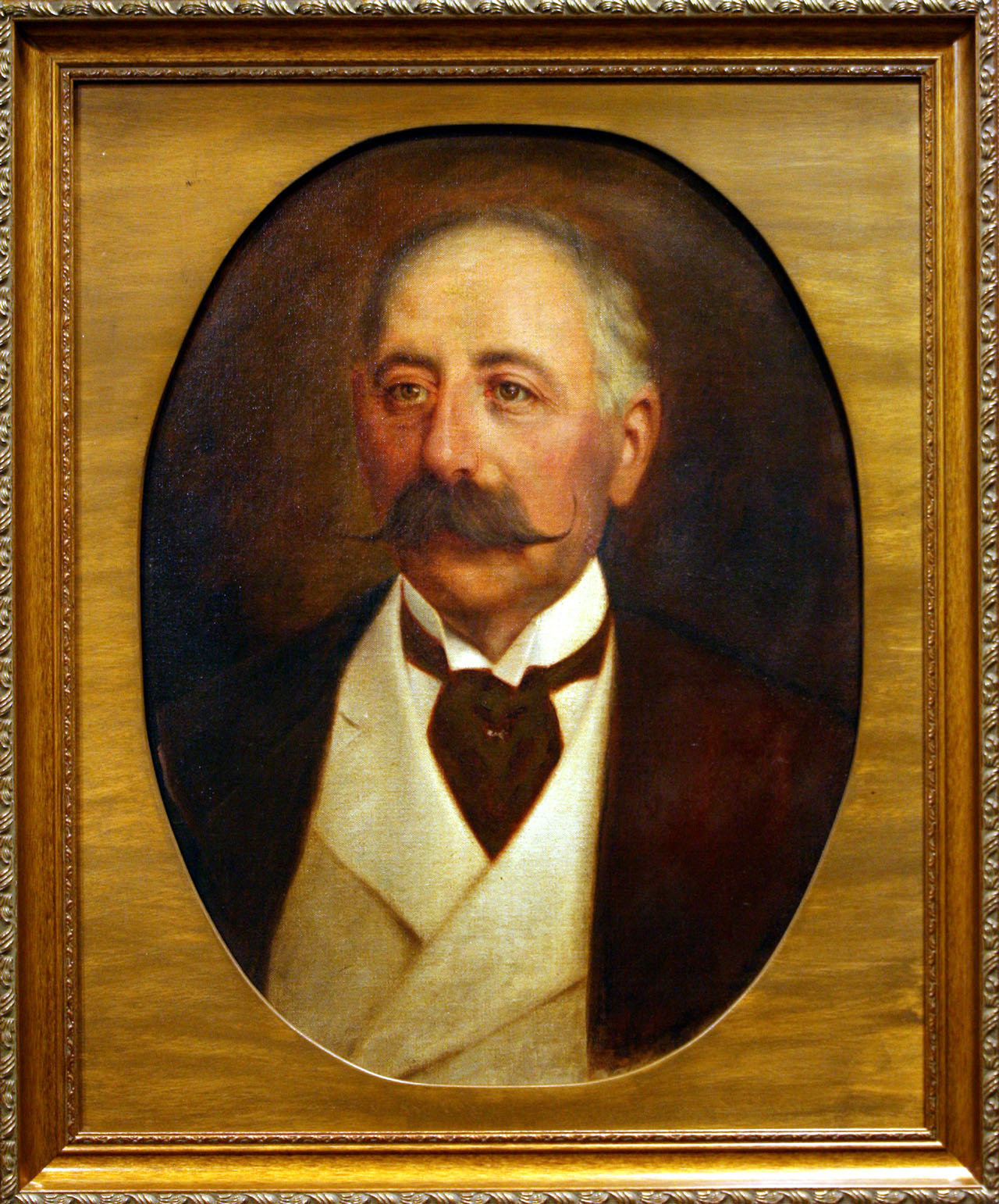 Tableau représentant Maurice de Hirsch